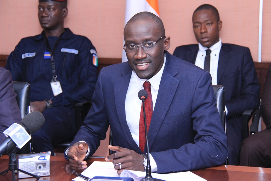 Ministre Abdourahmane Cisse à la conférence de presse sur l`amélioration des conditions d’accès des PME aux marchés publics.